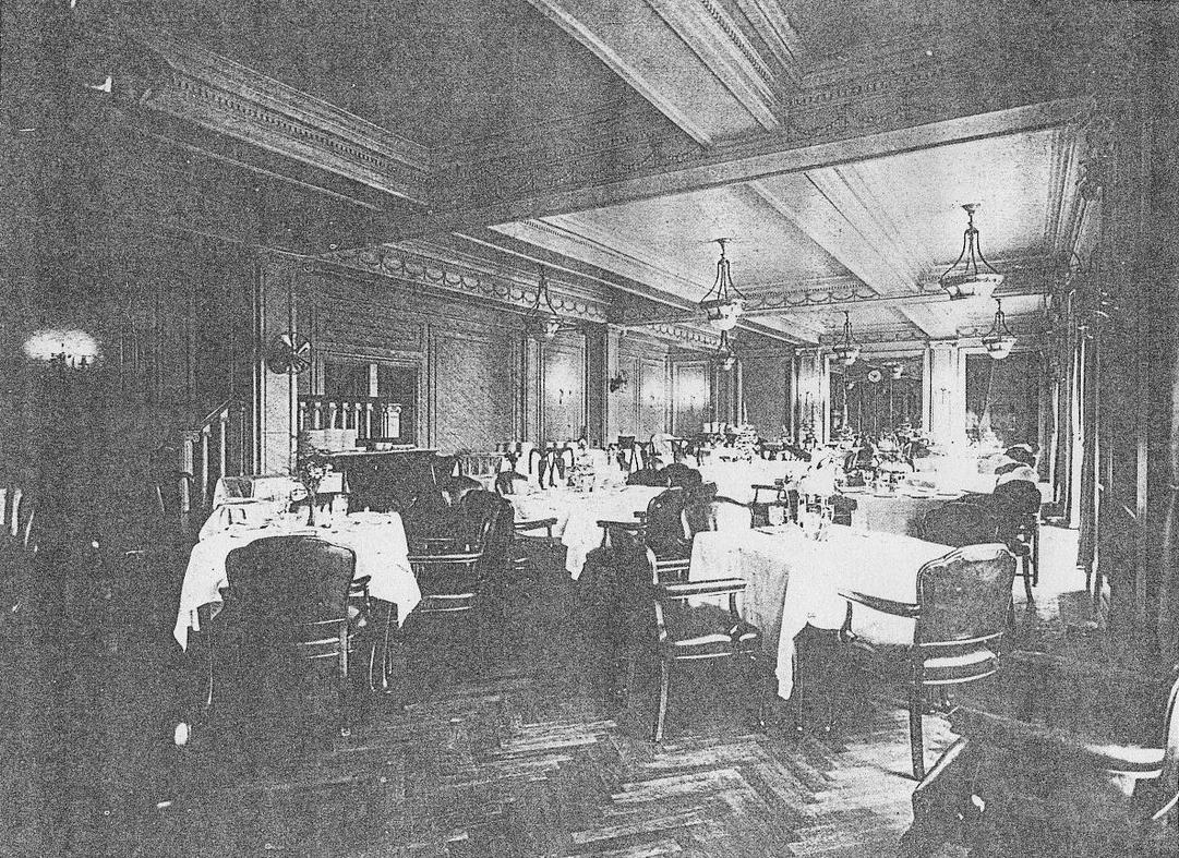 Vista del gran comedor del Club Americano, instalado en 1929 en los pisos superiores de la sede porteña del National City Bank of New York (hoy Citibank). Calles Bartolomé Mitre y San Martín. Ciudad de Buenos Aires, Argentina.